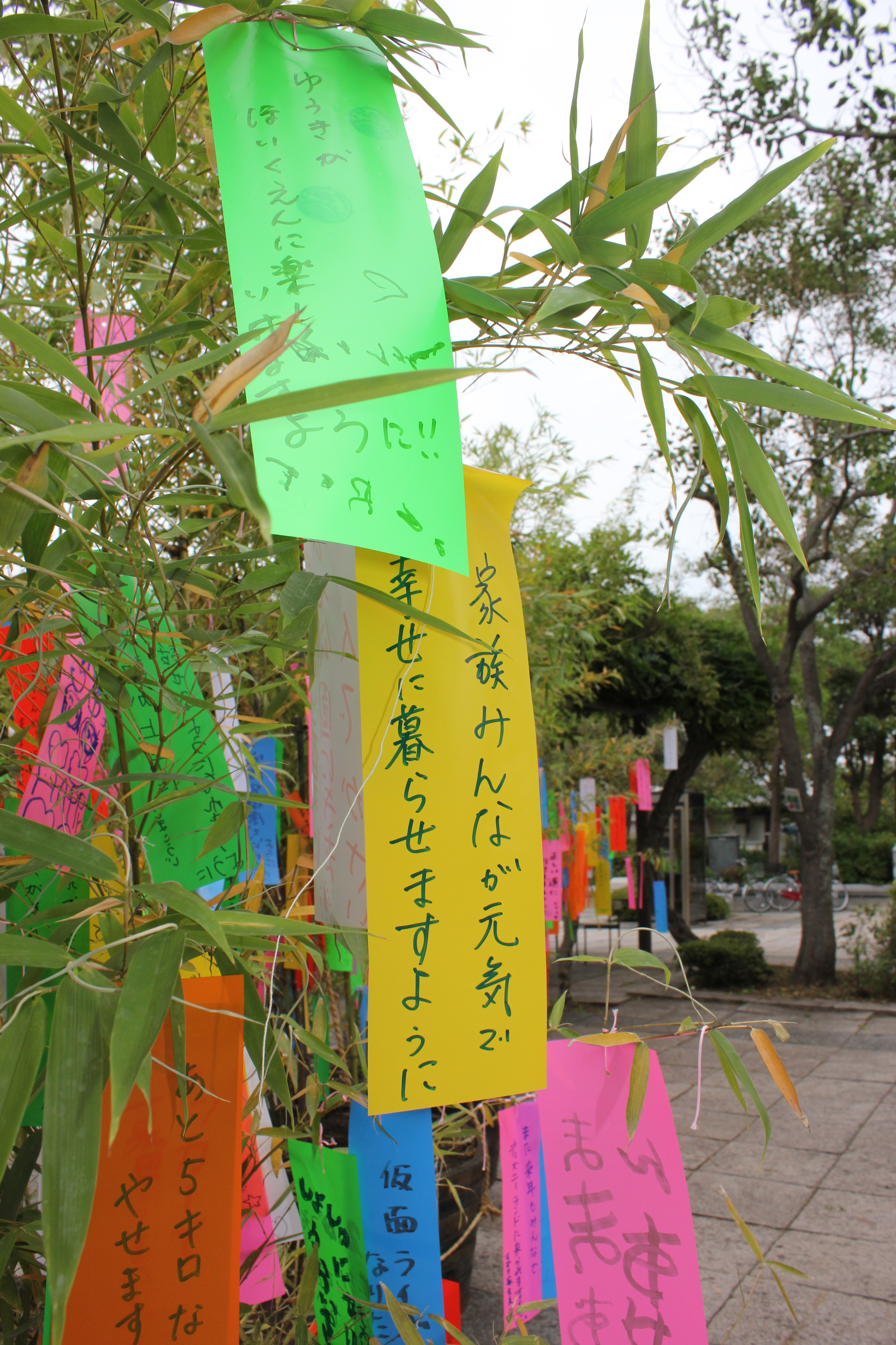 Tanabata Wishes